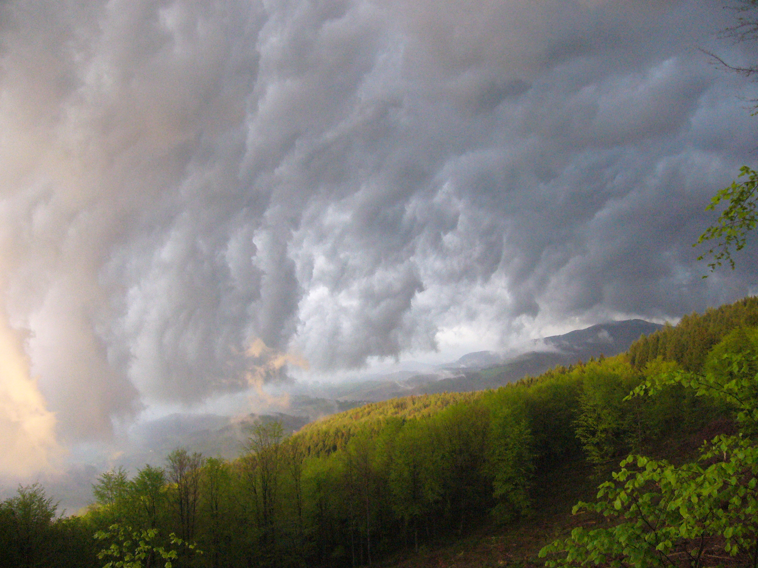 Ekaitzaren sorrera Gipuzkoako Urola-Kostan